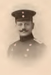 Porträtfoto von Joseph Bendix, aus: M. Friedrich: "Deutsche Helden"